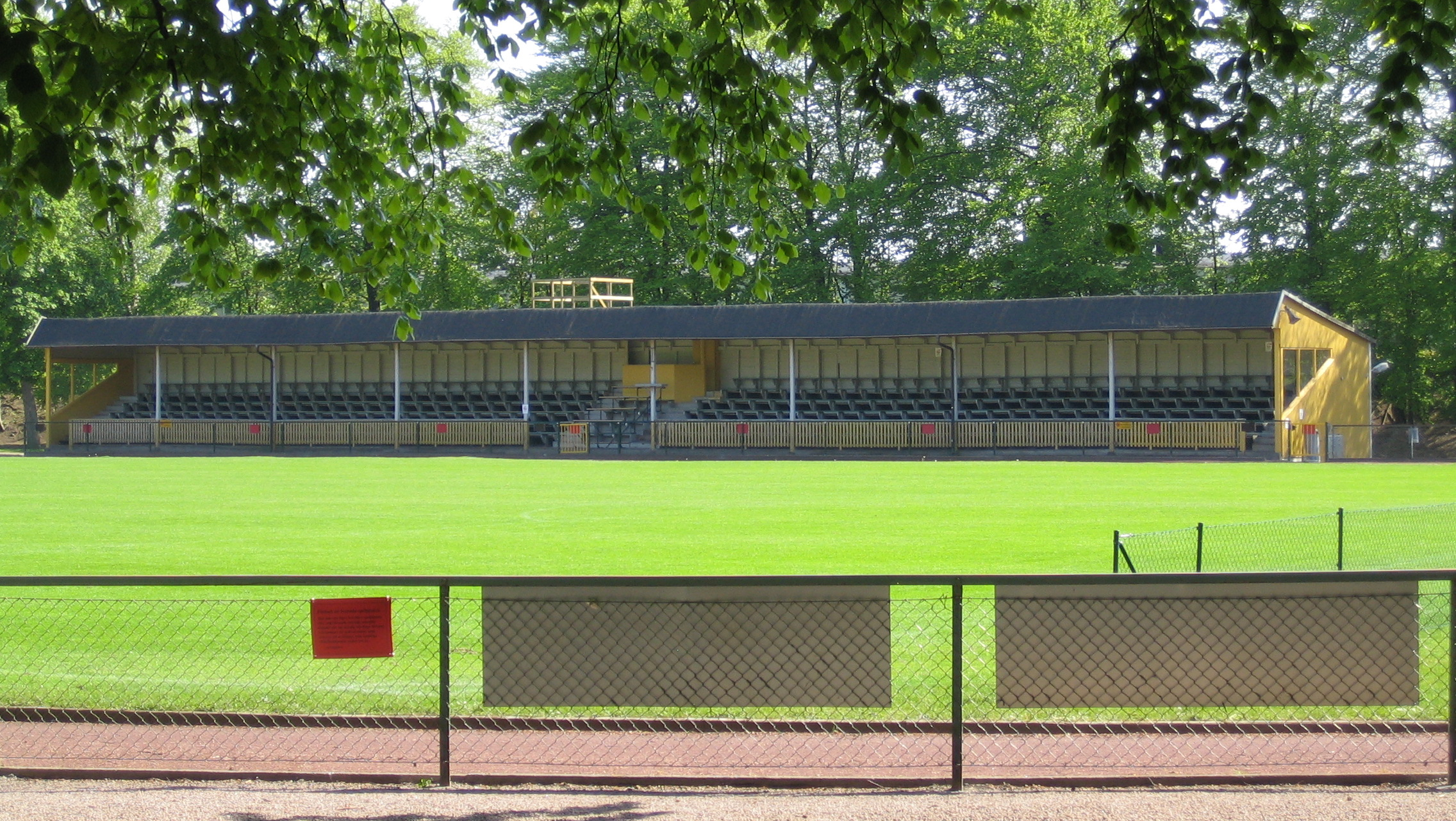 Limhamns Idrottsplats, Malmö